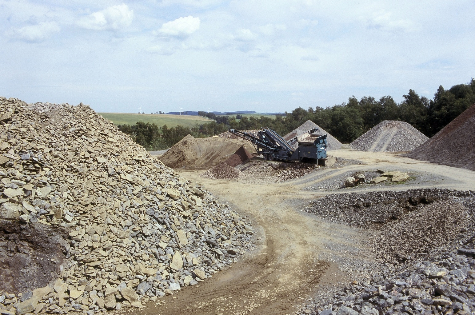 Halde des Schachtes 139 in Lauta bei Marienberg